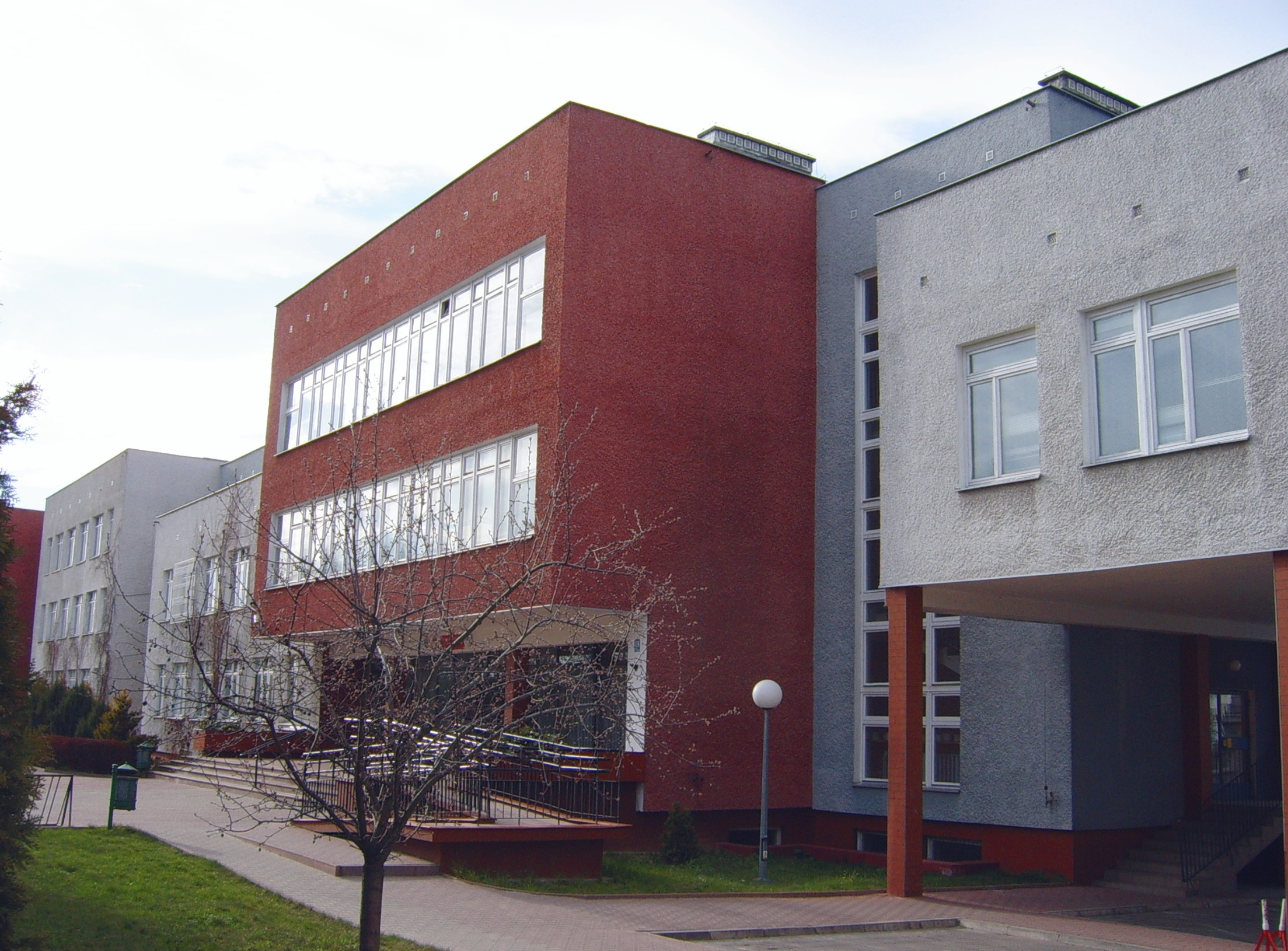 III Liceum Ogólnokształcące im. C. K. Norwida w Zamościu